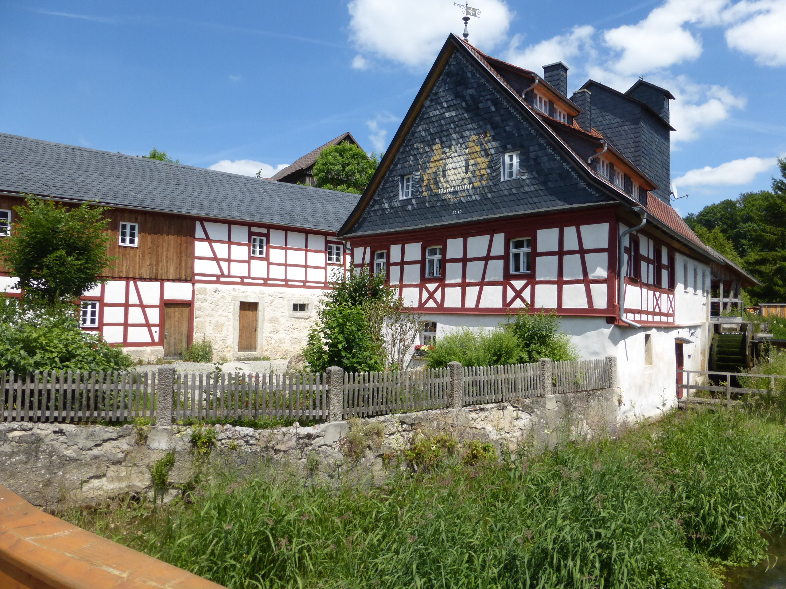 D-4-77-164-5